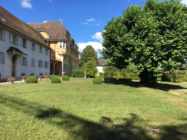 Photographie personnelle.